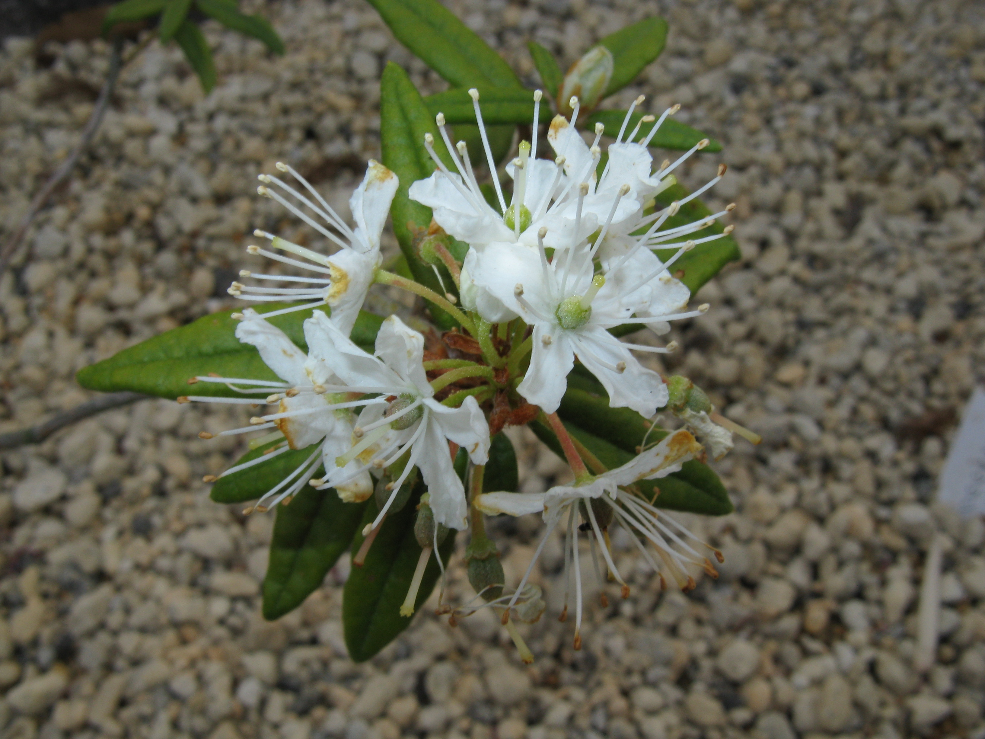 Ledum palustre subsp. diversipilosum